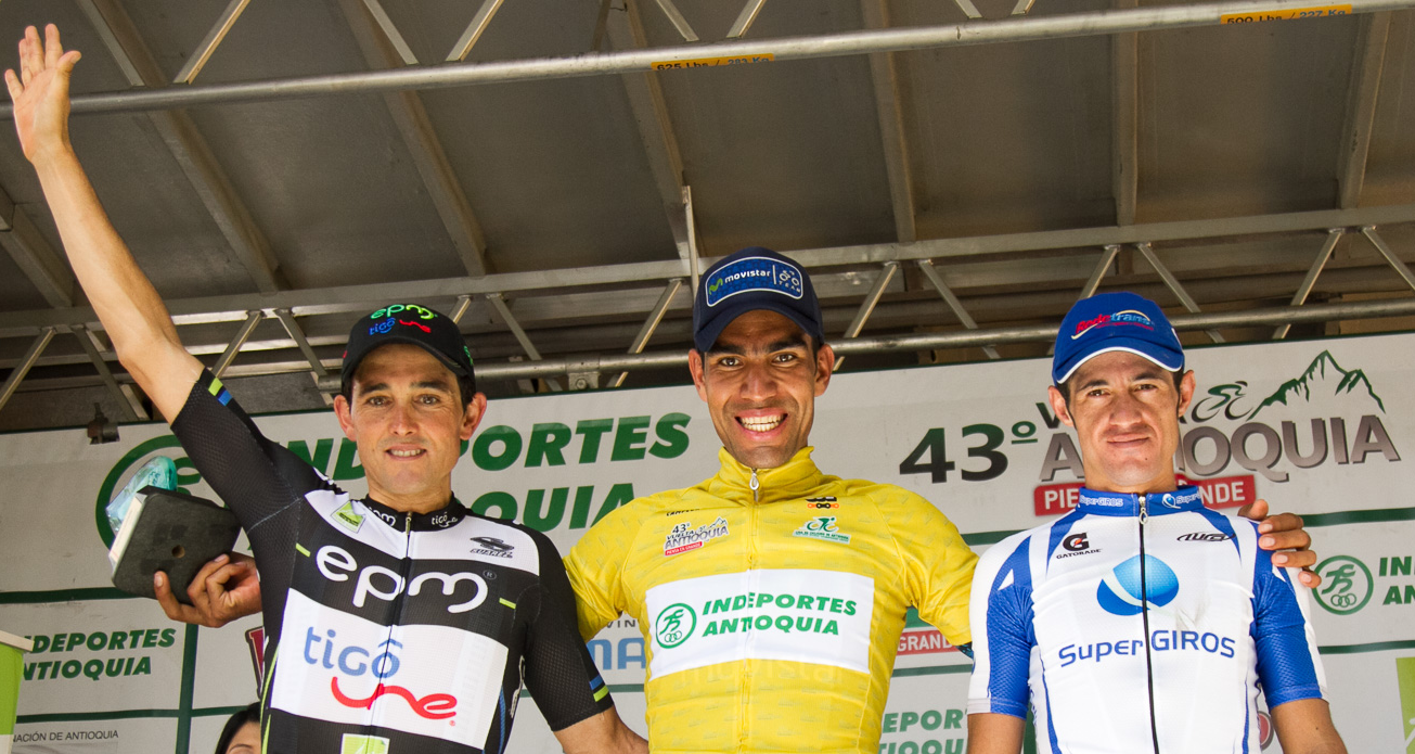 Podio de la Vuelta a Antioquia 2016